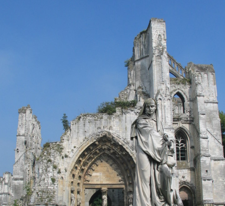 Rovine dell'Abbazia di San Bertino a Saint-Omer Francia